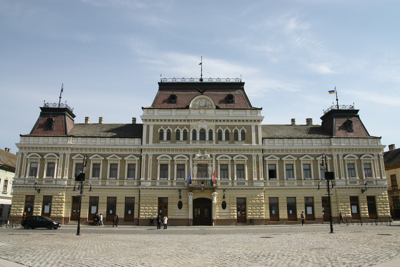 Városháza (Grassalkovich-ház) (Baja, Szentháromság tér 1., Deák Ferenc utca 2.) This is a photo of a monument in Hungary. Identifier: 2123